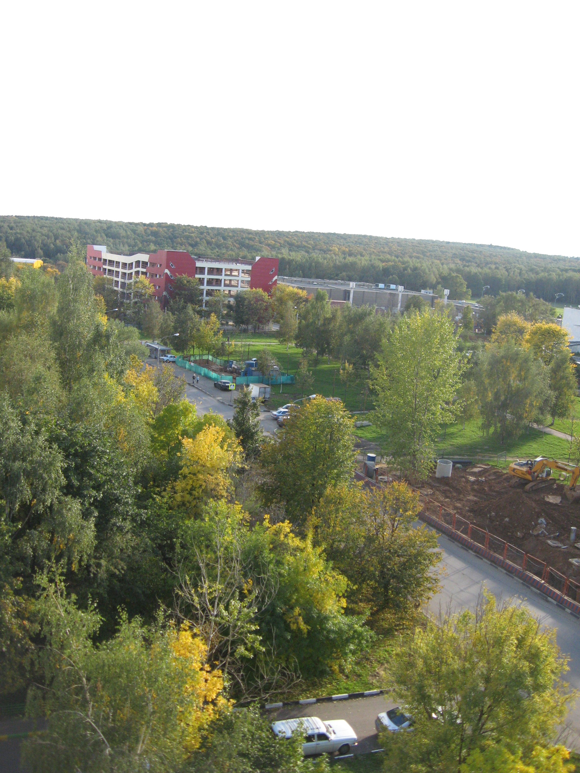 Вид на улицу Красного Маяка из окна одного из домов